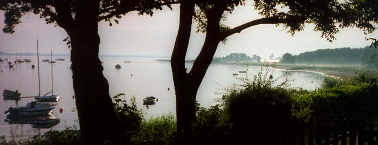 Flensburger Foerde, photo by Uwe Kils.